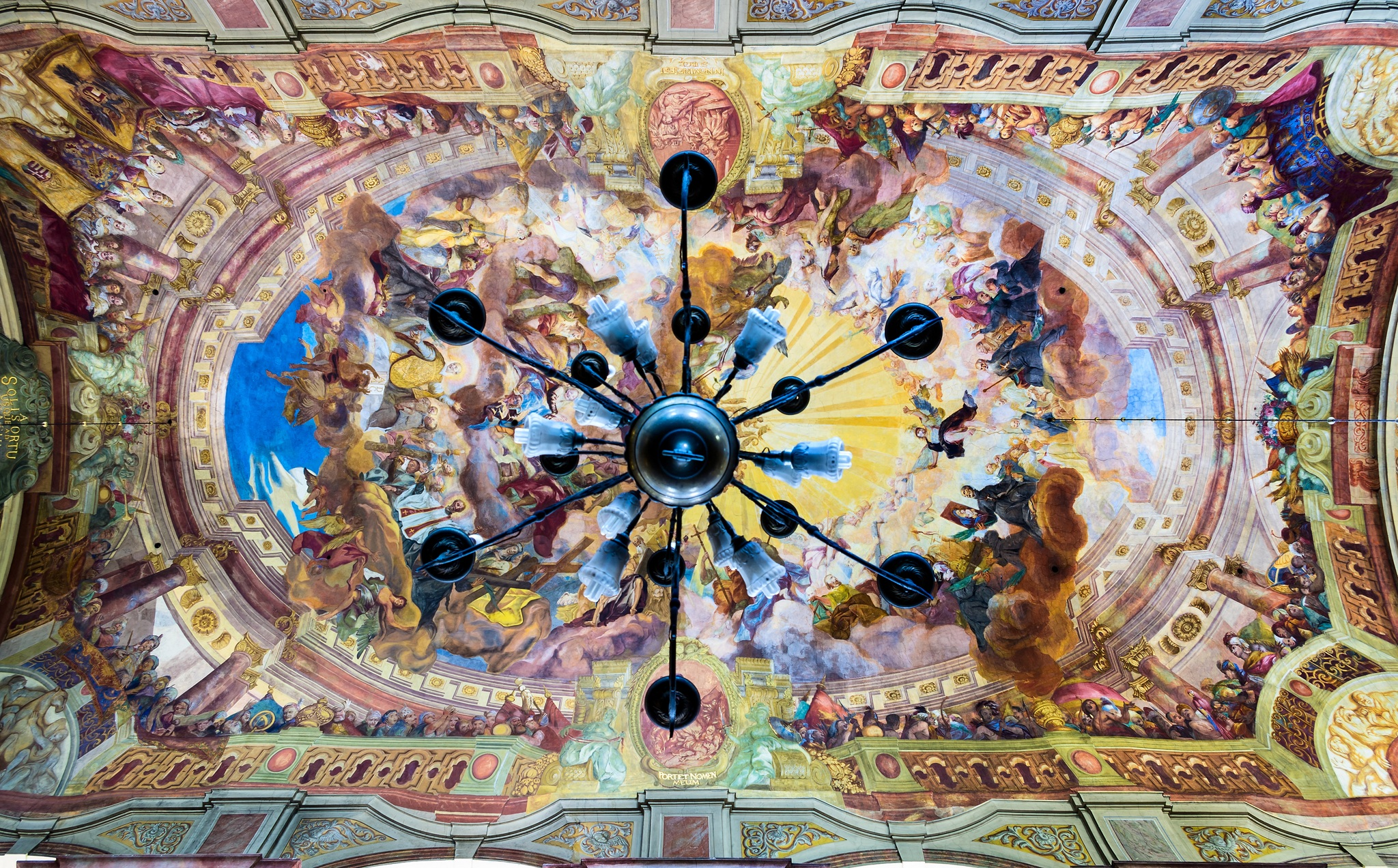 Kościół parafialny Najświętszego Imienia Jezus (Uniwersytecki) oo. jezuitów we Wrocławiu - sufit